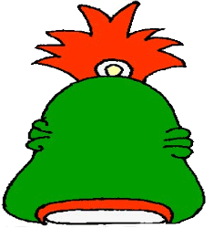 Glifo o escudo del municipio de Tlanchinol.